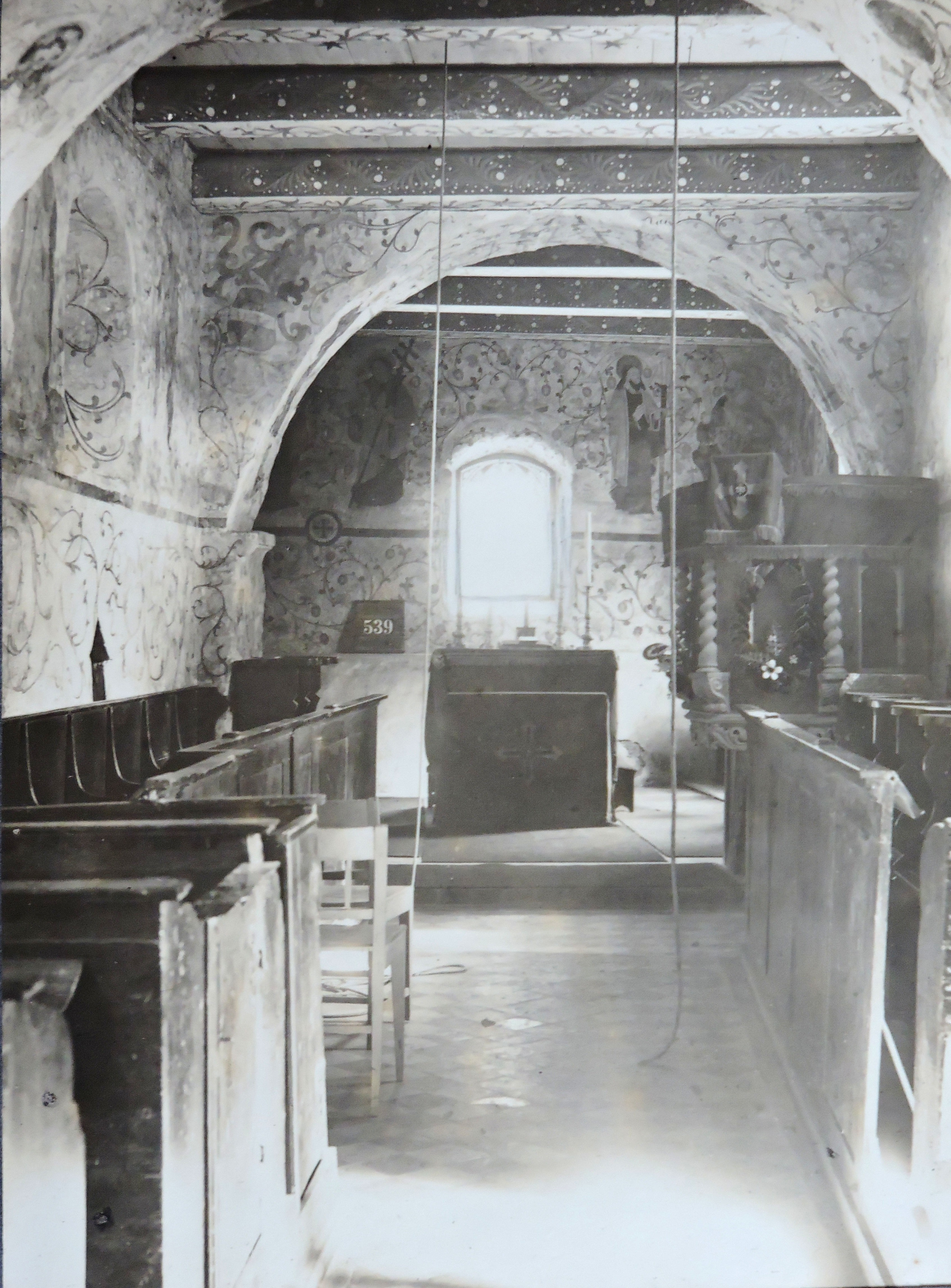 Dorfkirche Groppendorf innen (1906)